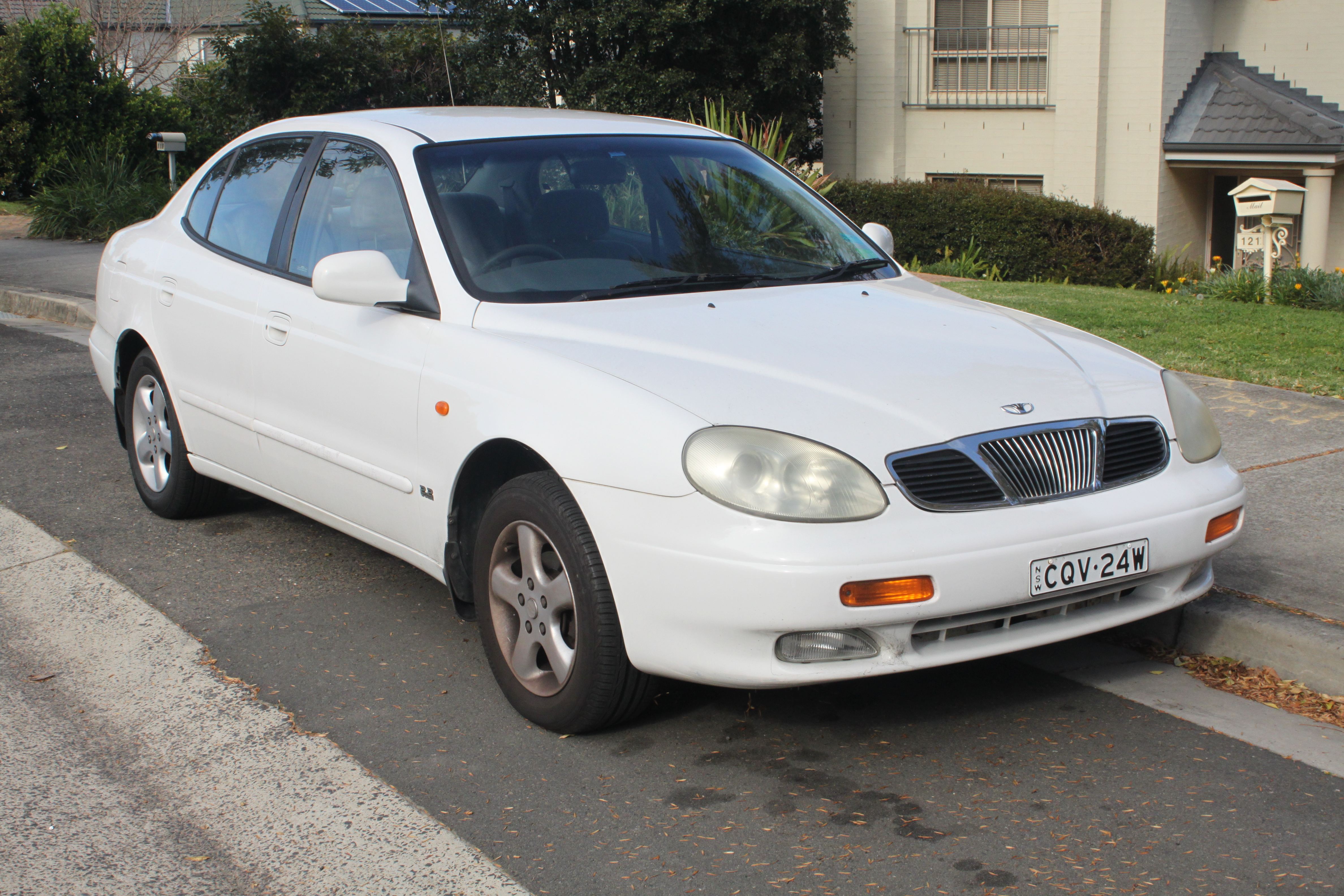 Daewoo Leganza V100